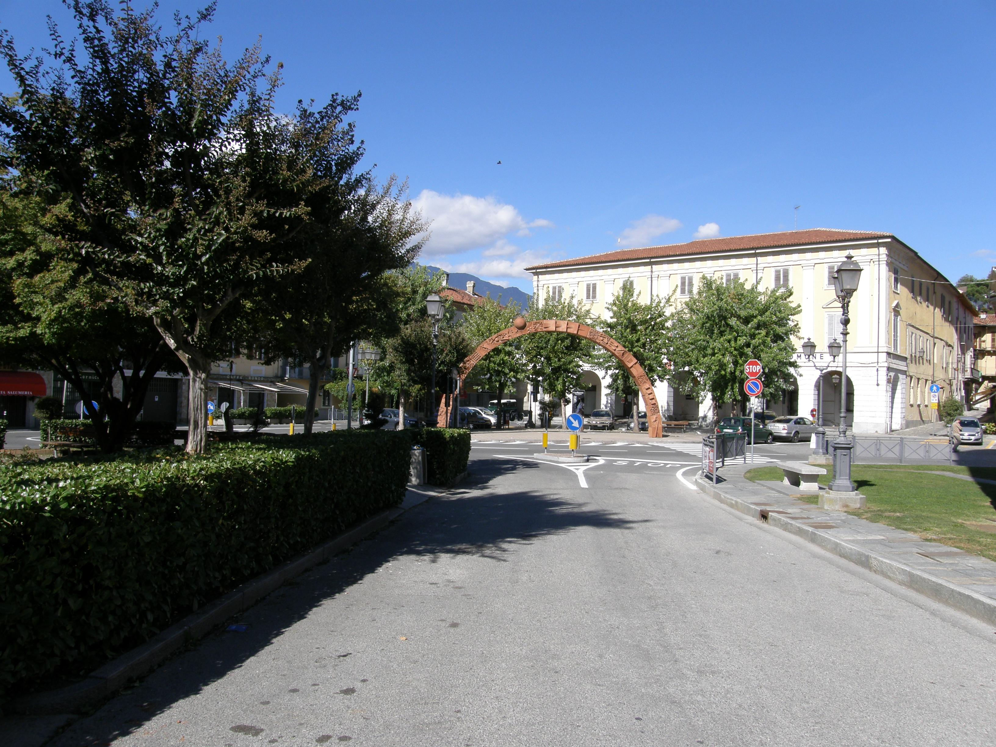 10081 Castellamonte TO, Italy